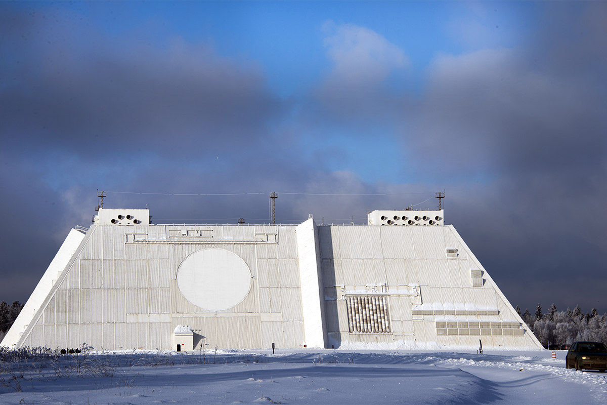 Радар Дон-2Н. Проведение тренировки боевыми расчётами системы ПРО 9-й дивизии противоракетной обороны.